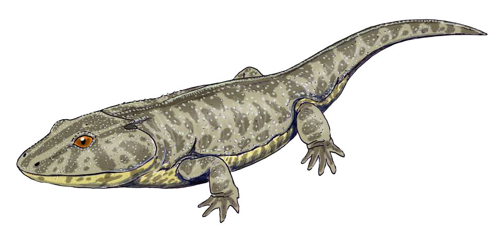 Lyddekerina, my own work